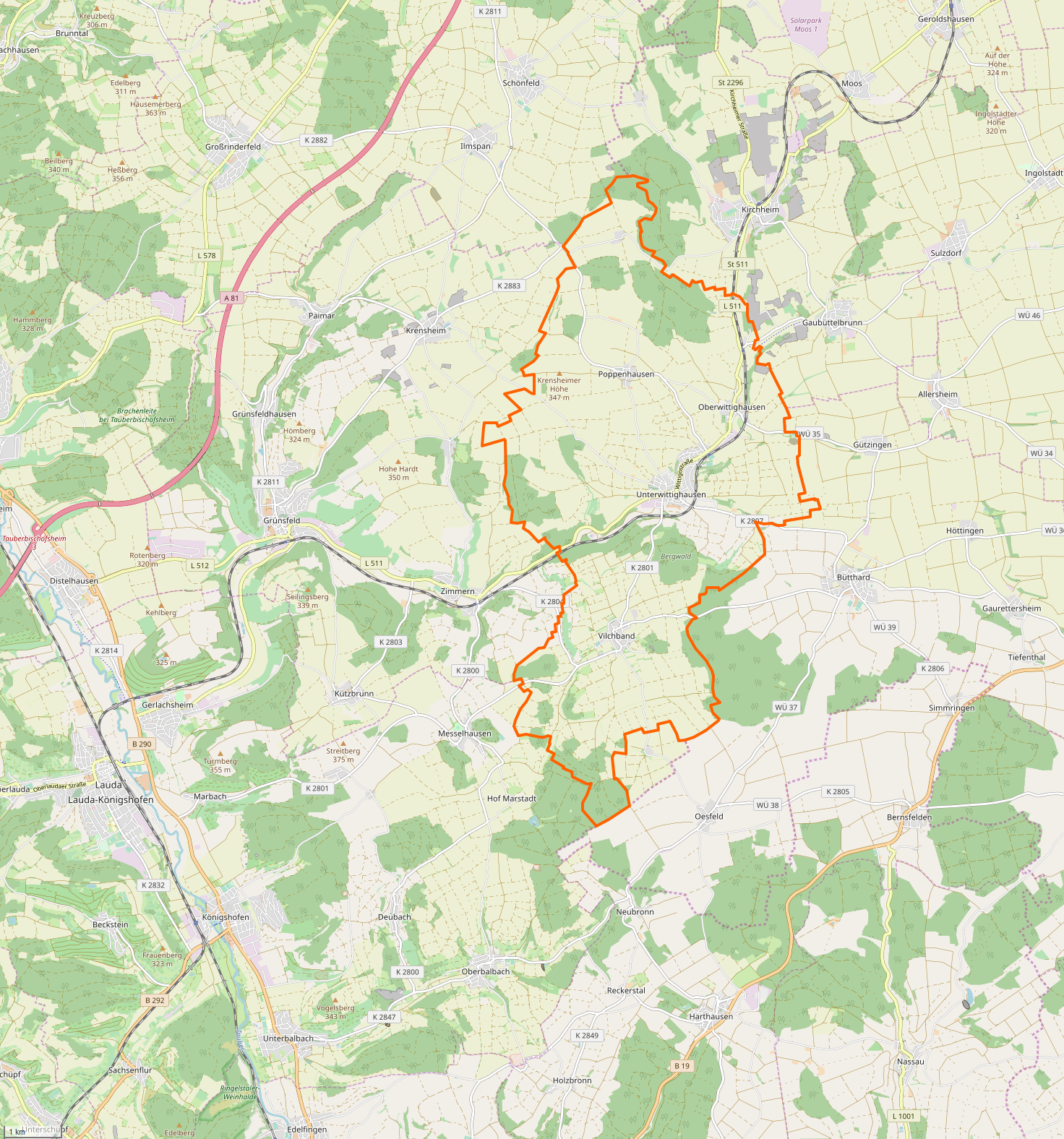 Gemarkung und Lage der Gemeinde Wittighausen. Siehe auch: Liste der Kulturdenkmale in Wittighausen. Liste der Straßennamen von Wittighausen. Gemarkungen und Lagen der Städte und sonstigen Gemeinden im Main-Tauber-Kreis: Ahorn · Assamstadt · Bad Mergentheim · Boxberg · Creglingen · Freudenberg · Großrinderfeld · Grünsfeld · Igersheim · Königheim · Külsheim · Lauda-Königshofen · Niederstetten · Tauberbischofsheim · Weikersheim · Werbach · Wertheim · Wittighausen